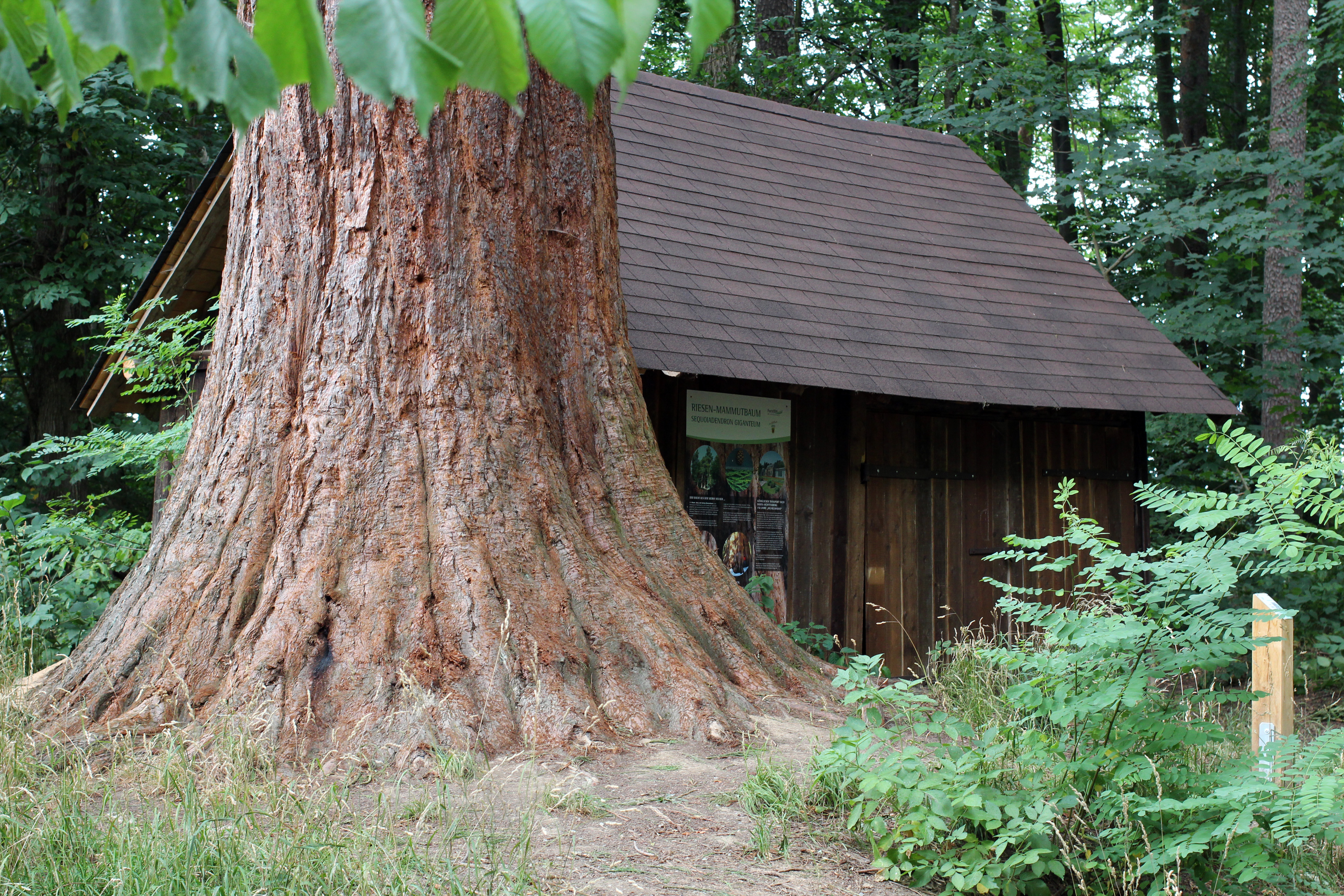 Der Fuß des Mammutbaums, direkt vor der dort stehenden Holzhütte mit einer Infotafel. Rund 20 m Entfernung bis zur Kreuzung Dettenhäußer Weg/Einsiedlersträßchen